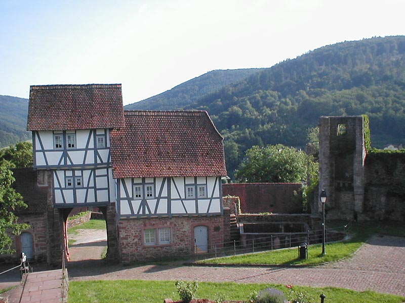 Torhaus der Burg Hirschhorn am Neckar, Blick von Innen mit dem dahinterliegenden Bergpanorama des auf der gegenüberliegenden neckarseite beginnenden „Kleinen Odenwalds“